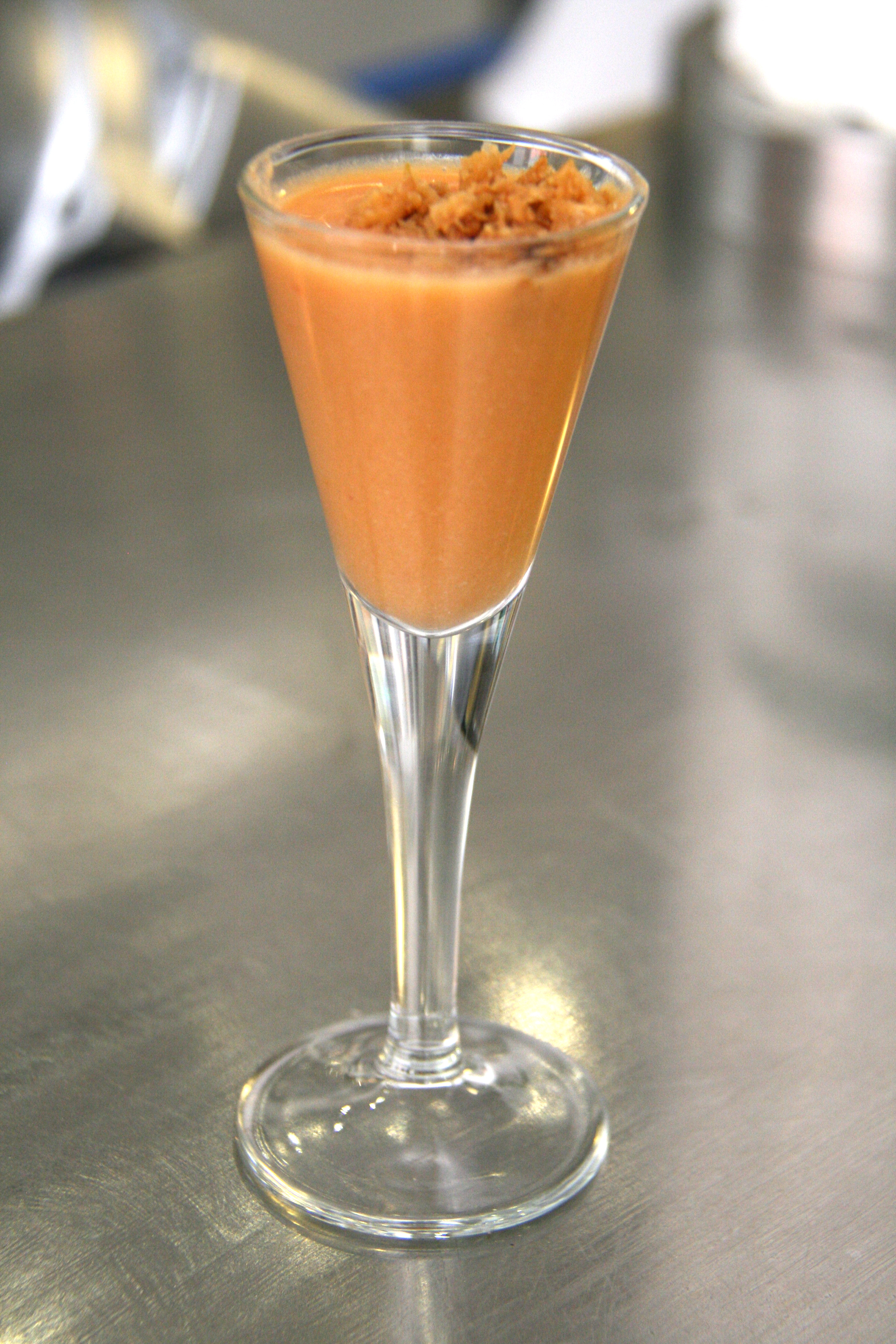 Gazpacho - Aperitivo (Madrid)